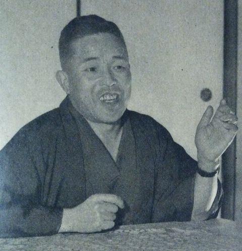 五代目宝井馬琴